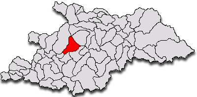 Categorie:Hărţi ale judeţului Maramureş